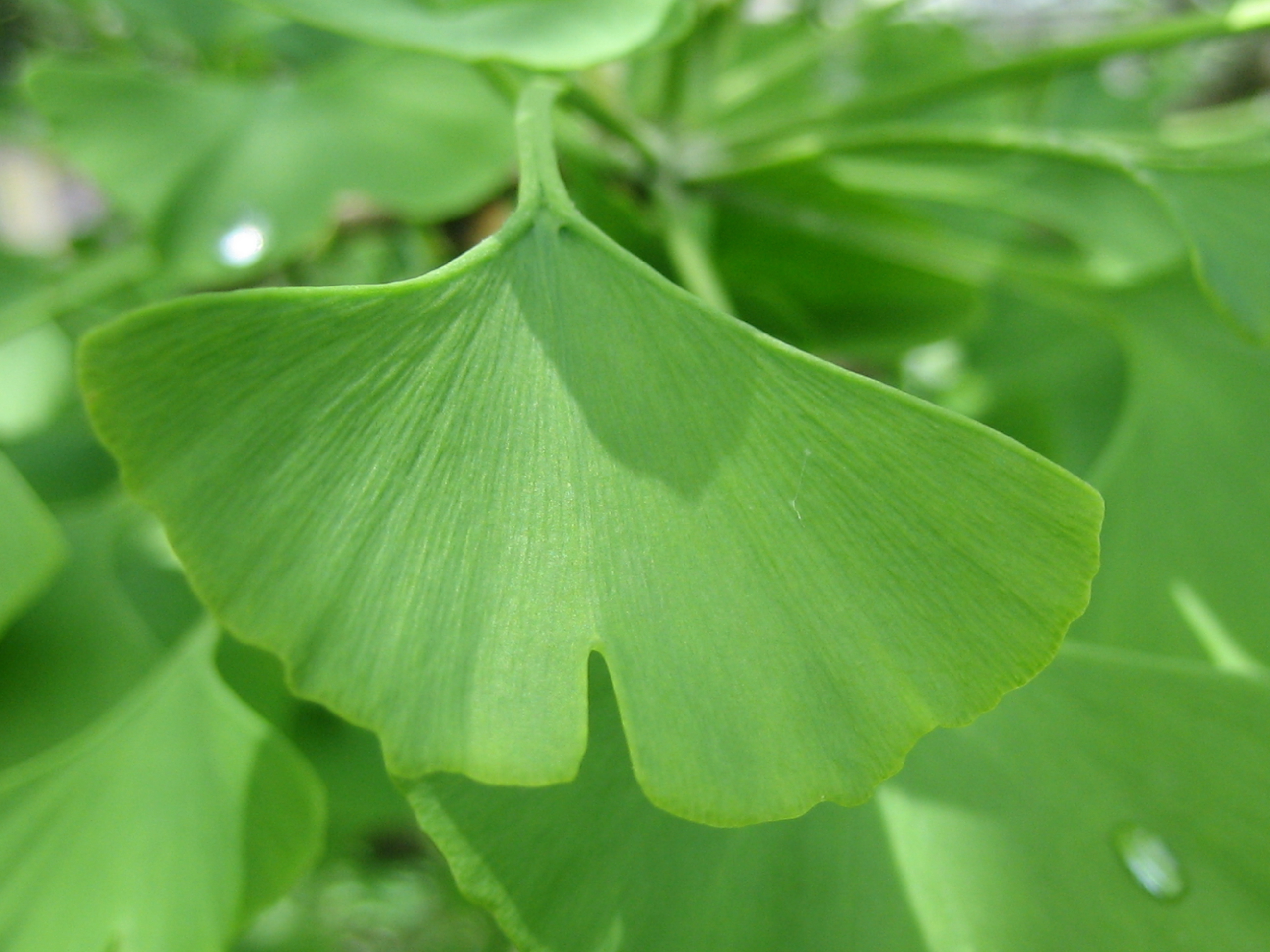 Blatt eines Ginkgobaums in der Nahaufnahme